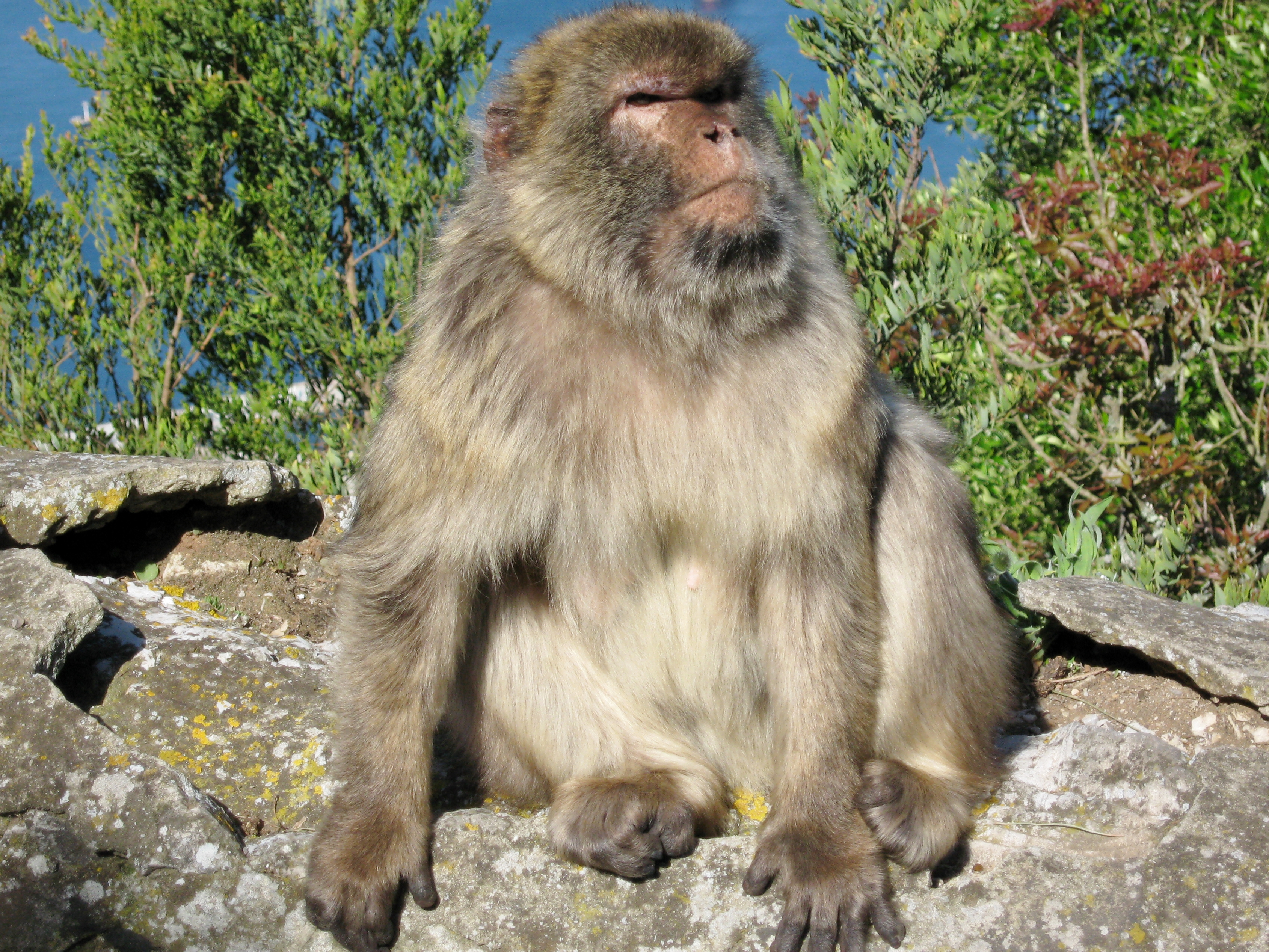 Macaca sylvanus, Gibraltar